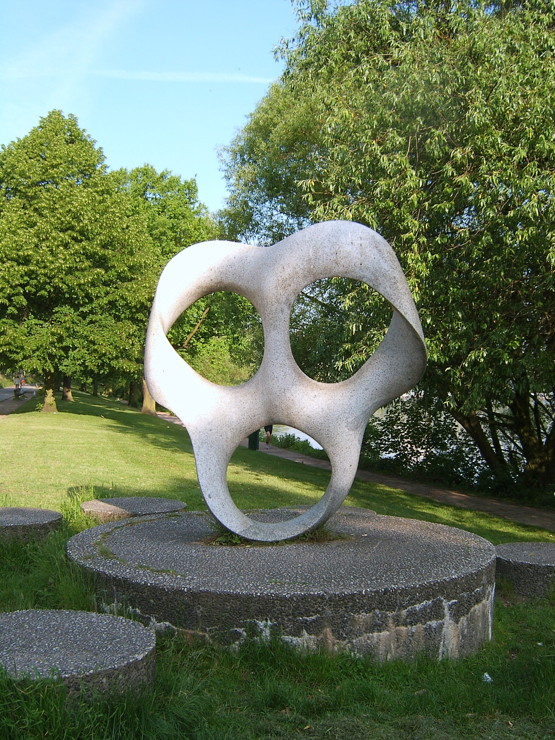 Bildbeschreibung:Rhythmus im Raum (1968) Hamburg Außenalster Kunstwerk von Max Bill Fotograf: selbst Datum: 9.6.2006